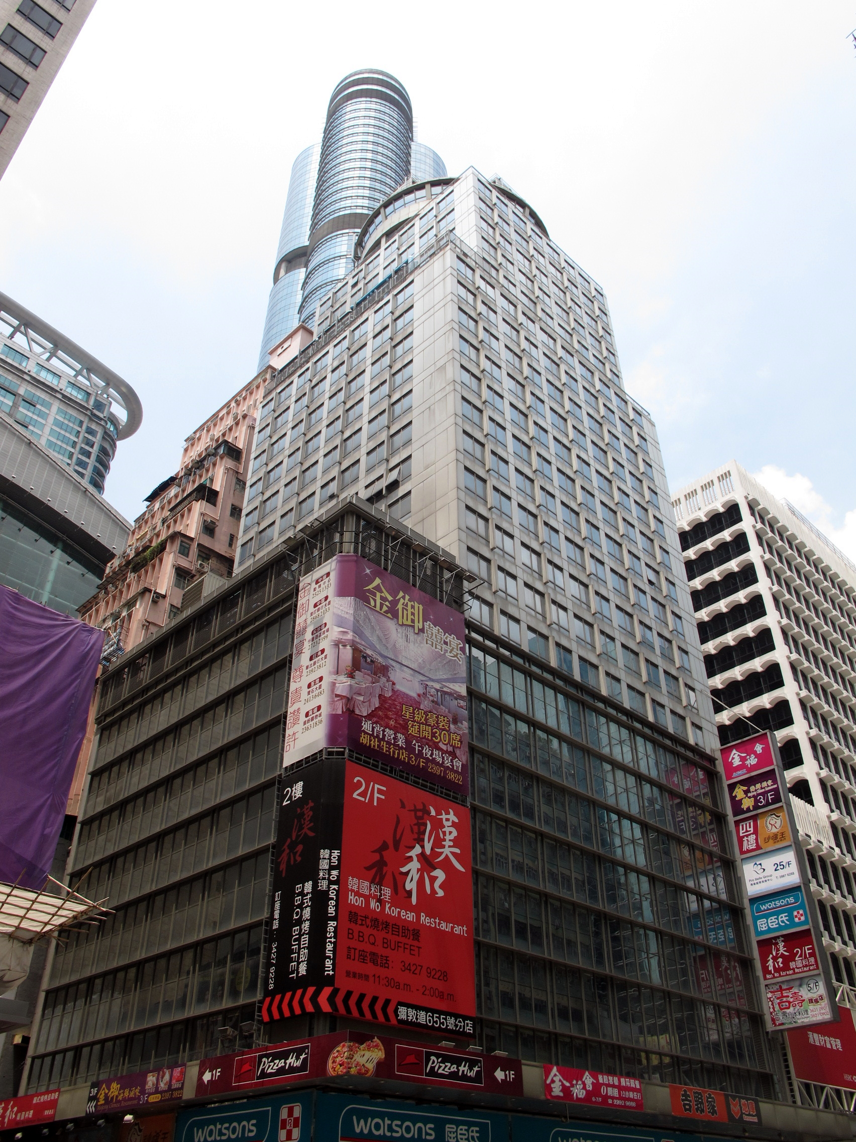 Wu Sang Building